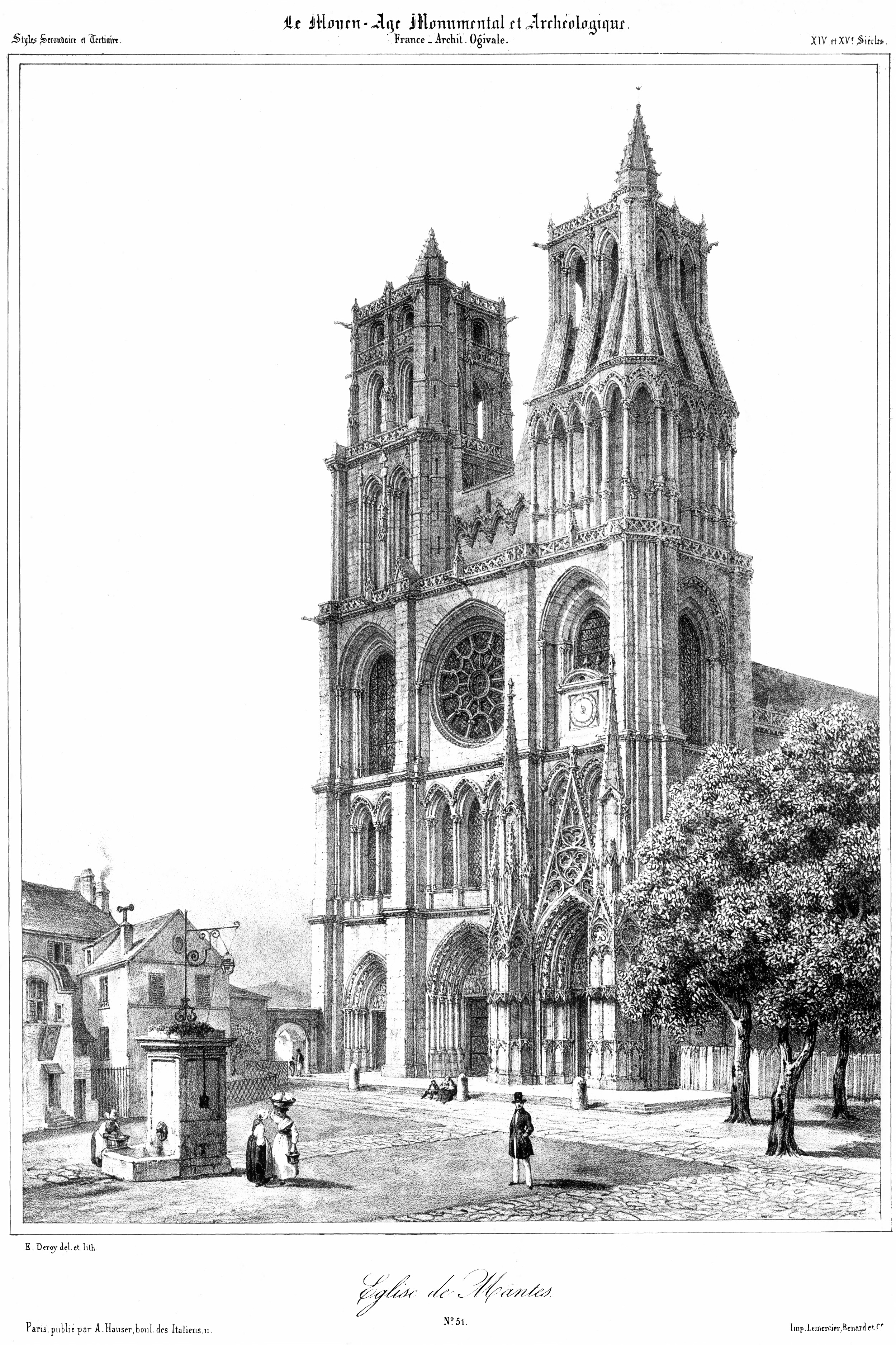 Représentation de la collégiale Notre-Dame de Mantes autour de 1843 (œuvre non datée précisément) avant les sur-restaurations auxquelles Alphonse Durand a notamment pris part, en particulier sur les parties supérieures.